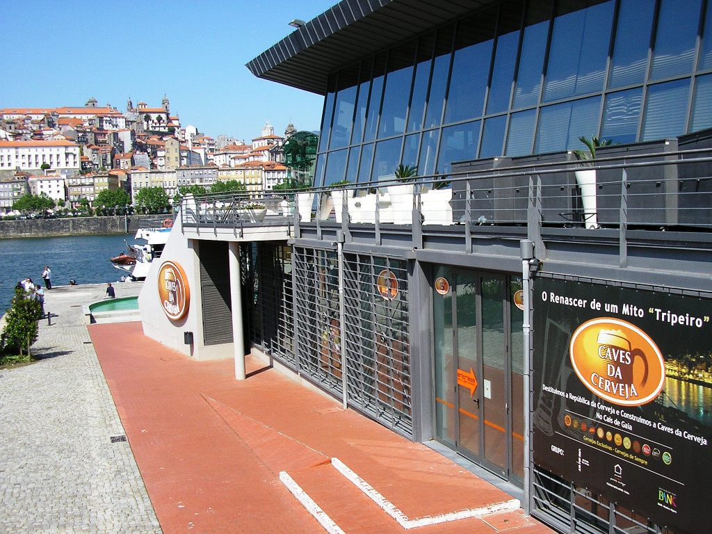 "Cais de Gaia" in Vila Nova de Gaia, Portugal